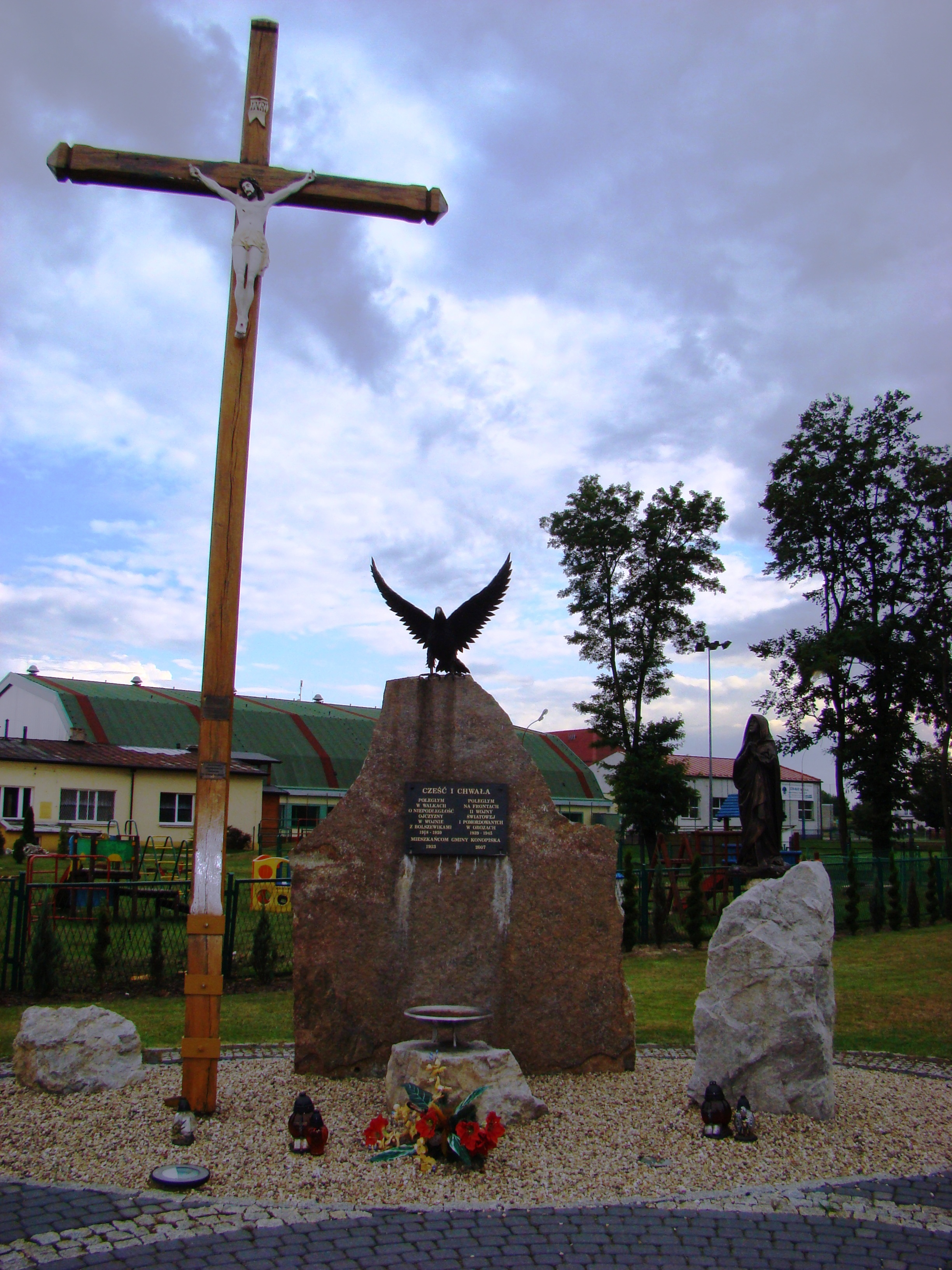 "Golgota Konopisk"- pomnik poświęcony mieszkańcom gminy poległym w wojnie polsko-bolszewickiej oraz w czasie II wojny światowej